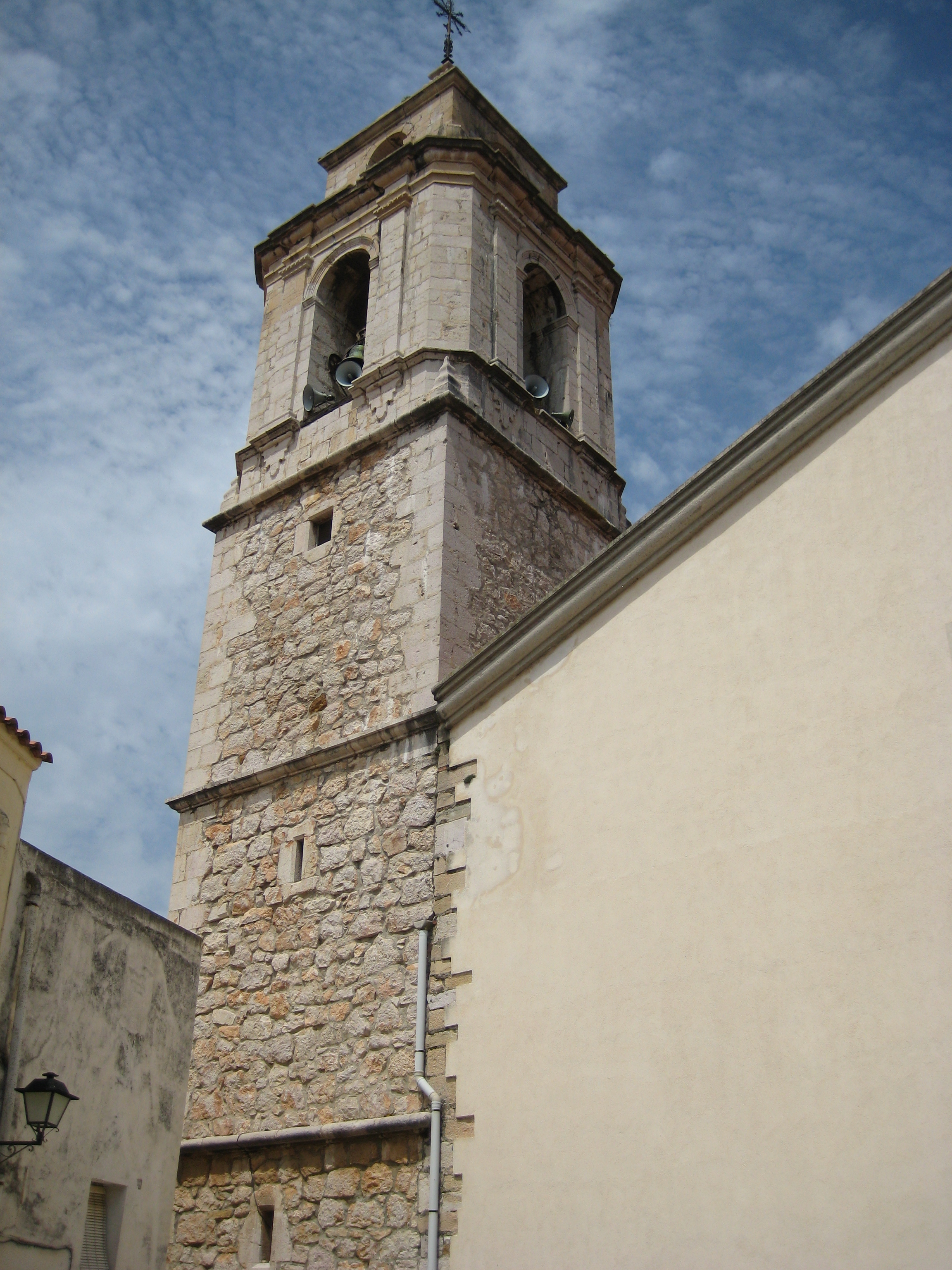 Torre campanar de l'església dels sant Joans de Rossell (Baix Maestrat)